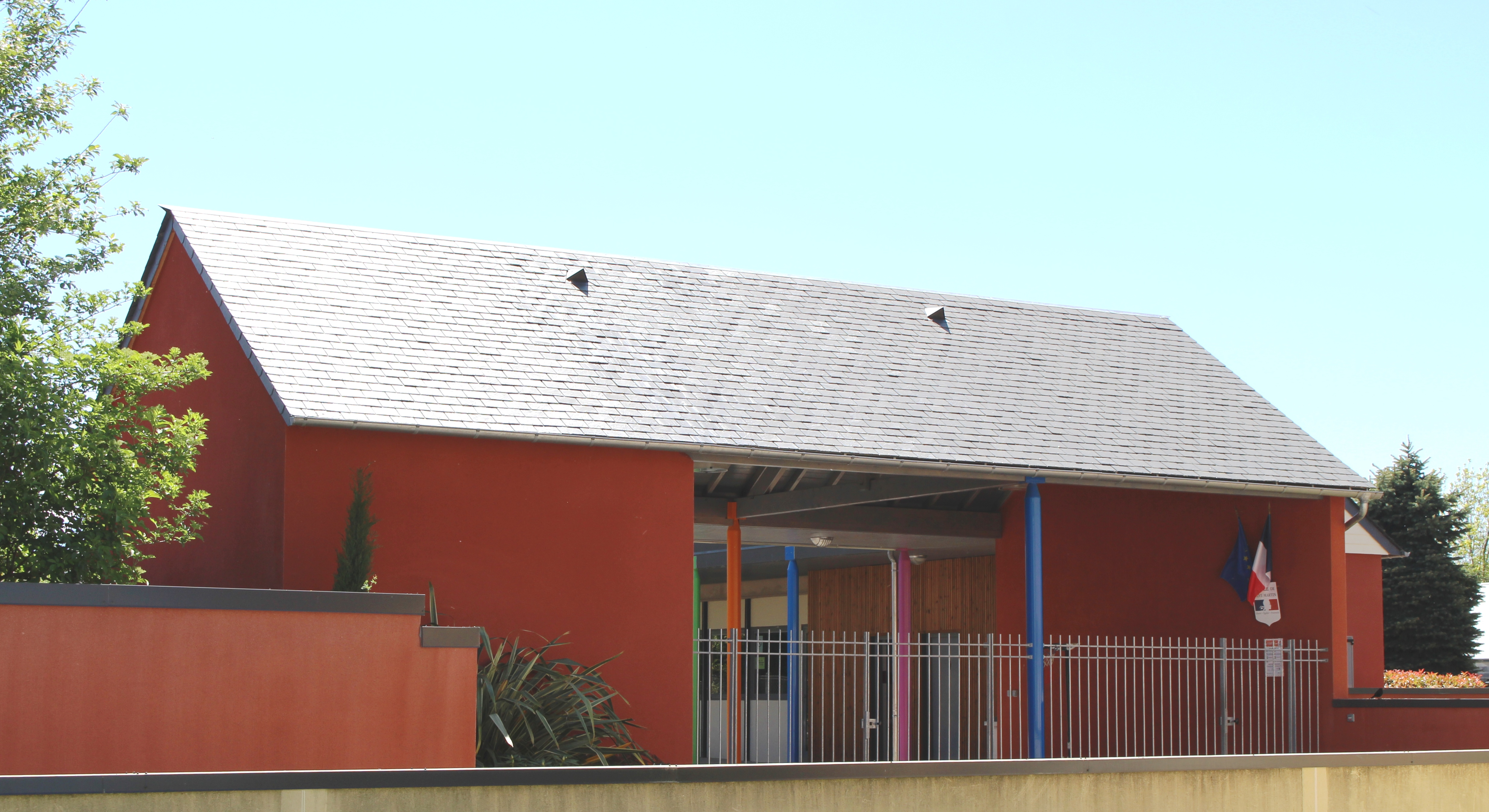 École de Saint-Martin (Hautes-Pyrénées)